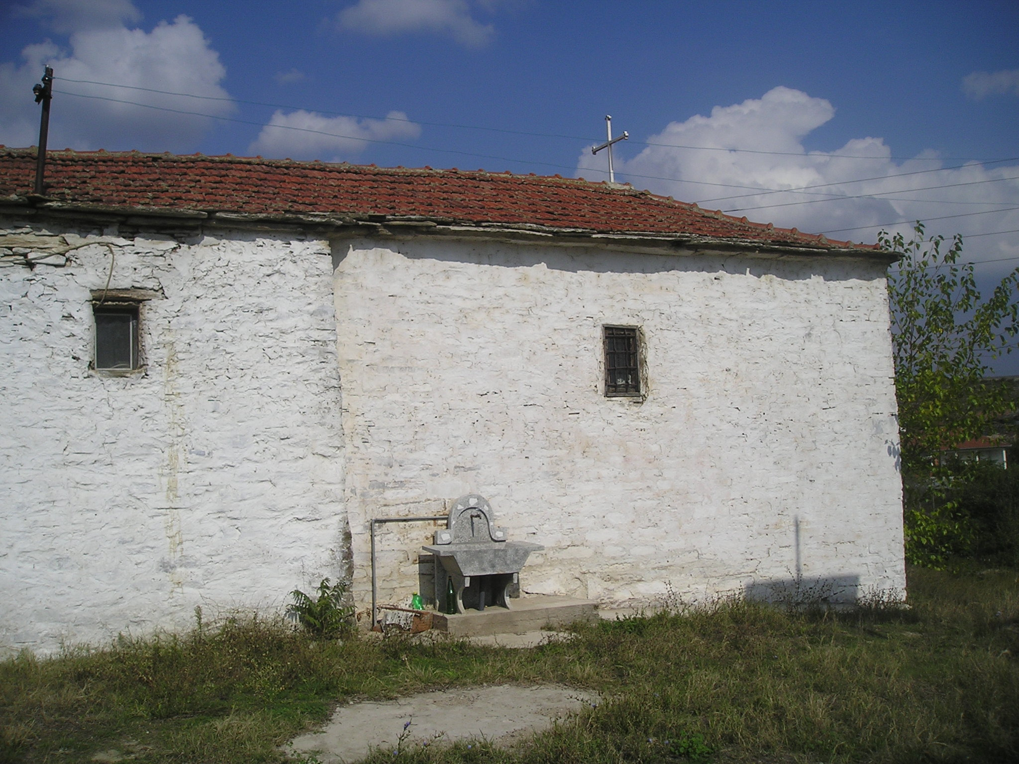 Църквата „Свети Спас“ в село Ногаевци, Република Македония.